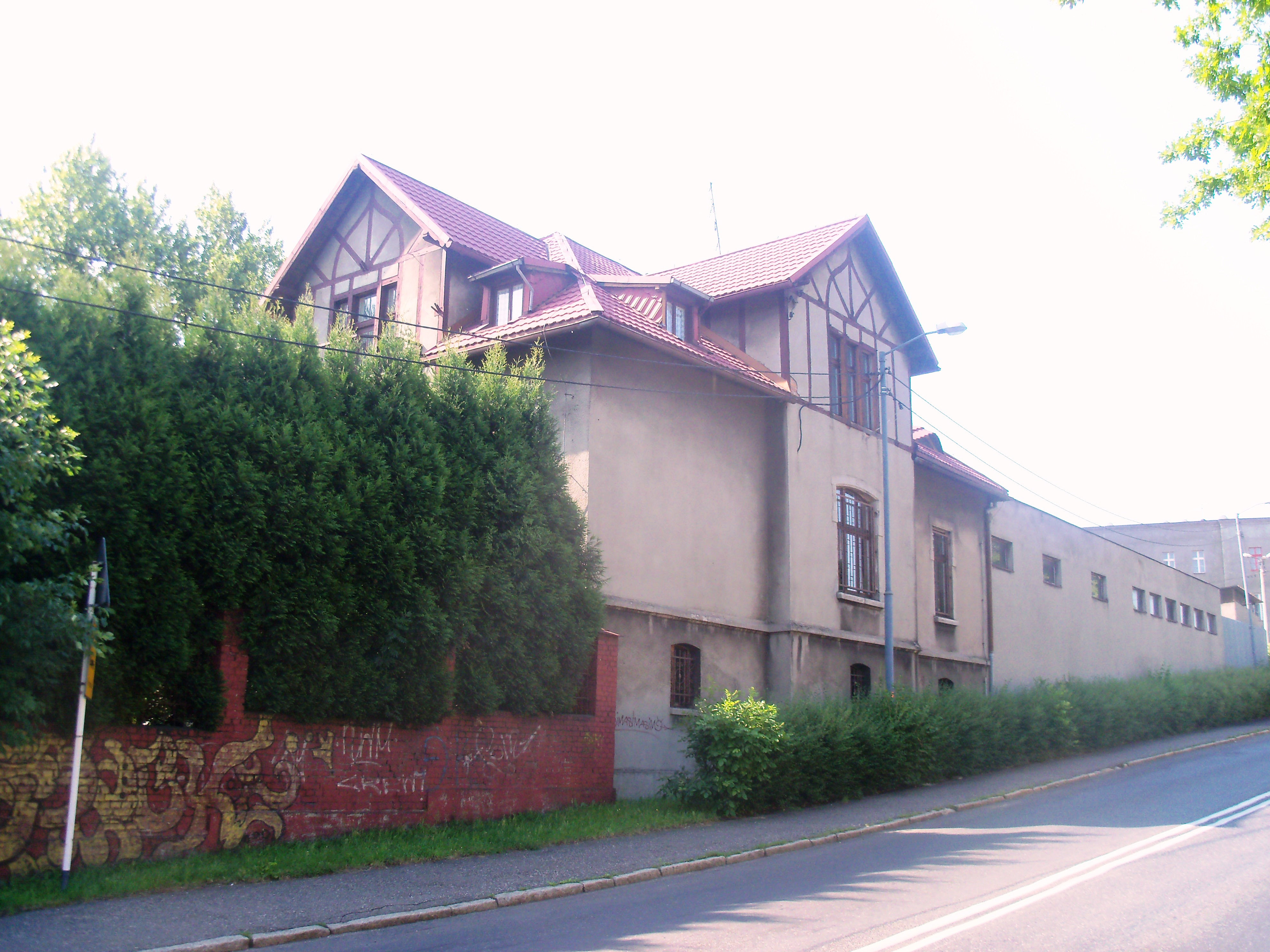 Willa Jacobsena w Katowicach Szopienicach przy ul. ks. bpa Herberta Bednorza 60. Obiekt wpisano do rejestru zabytków 17 czerwca 1982 (nr rej.: A/1291/82).